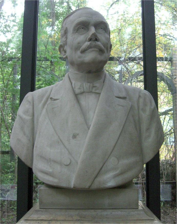 Martin Goetze - Albert von Maybach